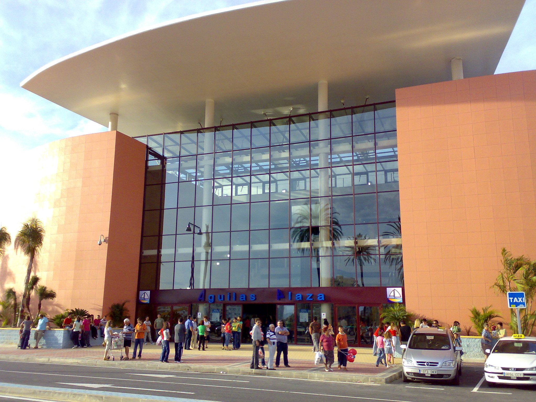 Puerta principal del centro comercial Águilas Plaza, en la localidad de Águilas (Región de Murcia).